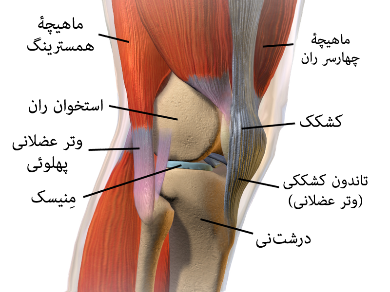 نشان‌دهندۀ آناتومی زانو و برخی اجزای آن